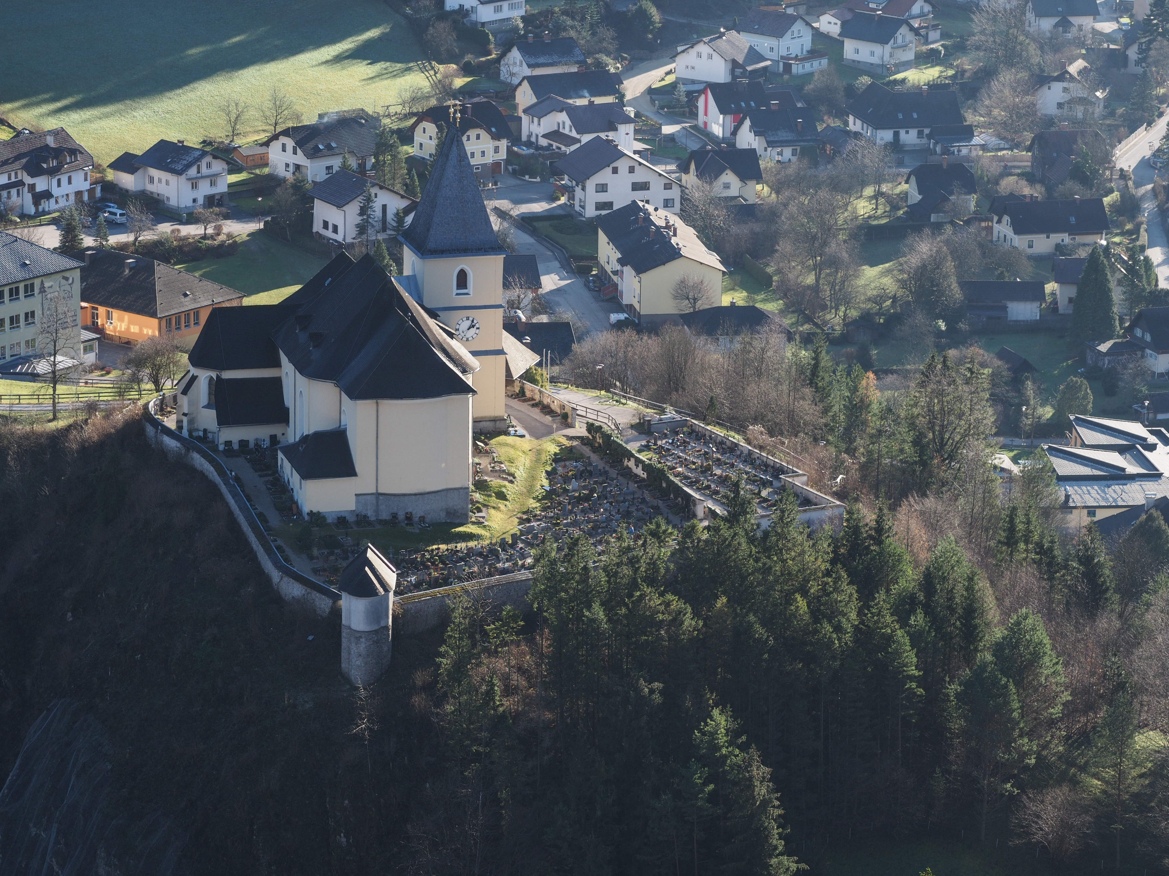 Pfarrkirche und Friedhof in Hollenstein an der Ybbs, aufgenommen vom Oisberg